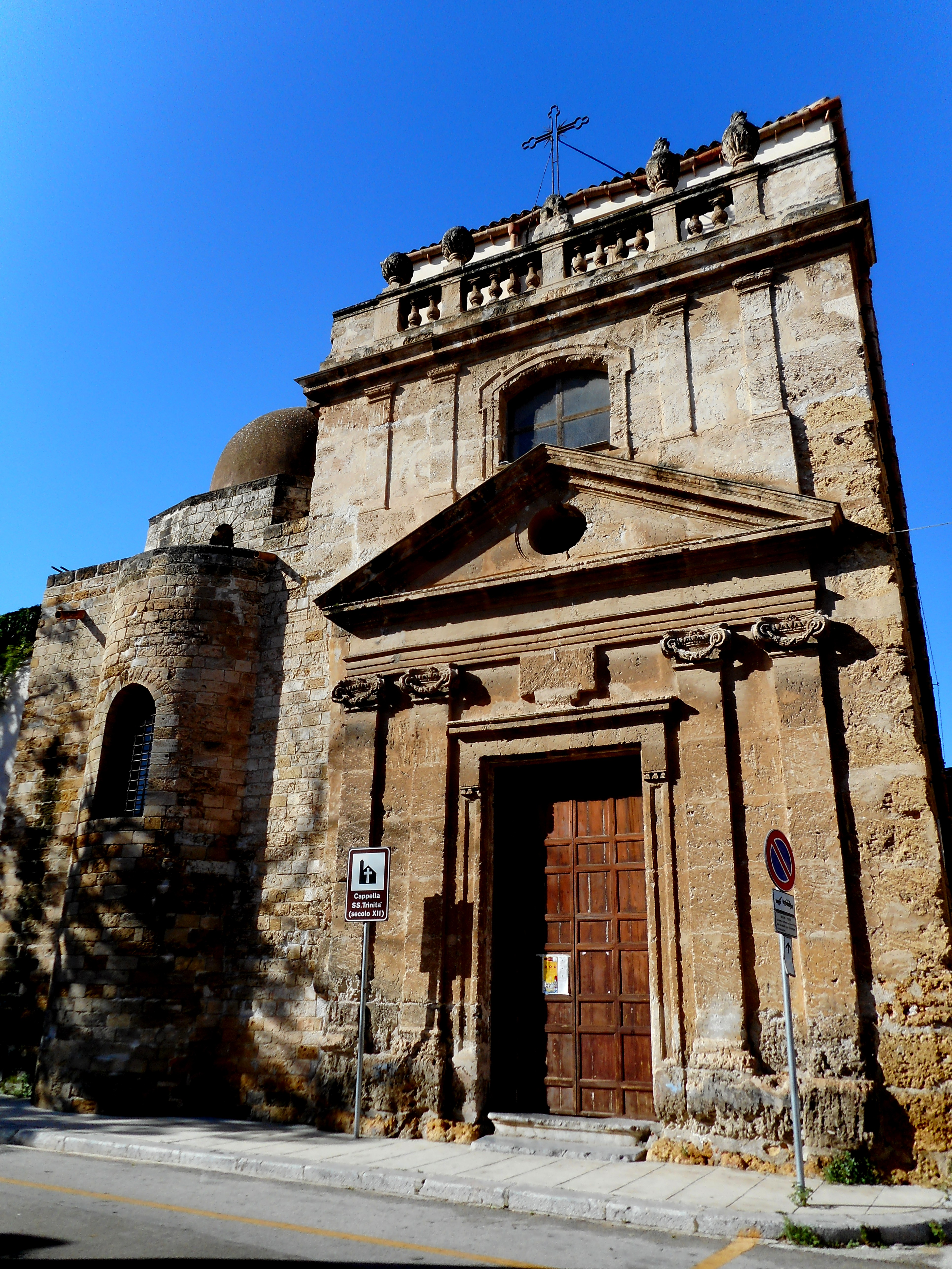 Facciata della chiesa di Gesù Maria e Santo Stefano vicino alla cappella della Santissima Trinità alla Zisa